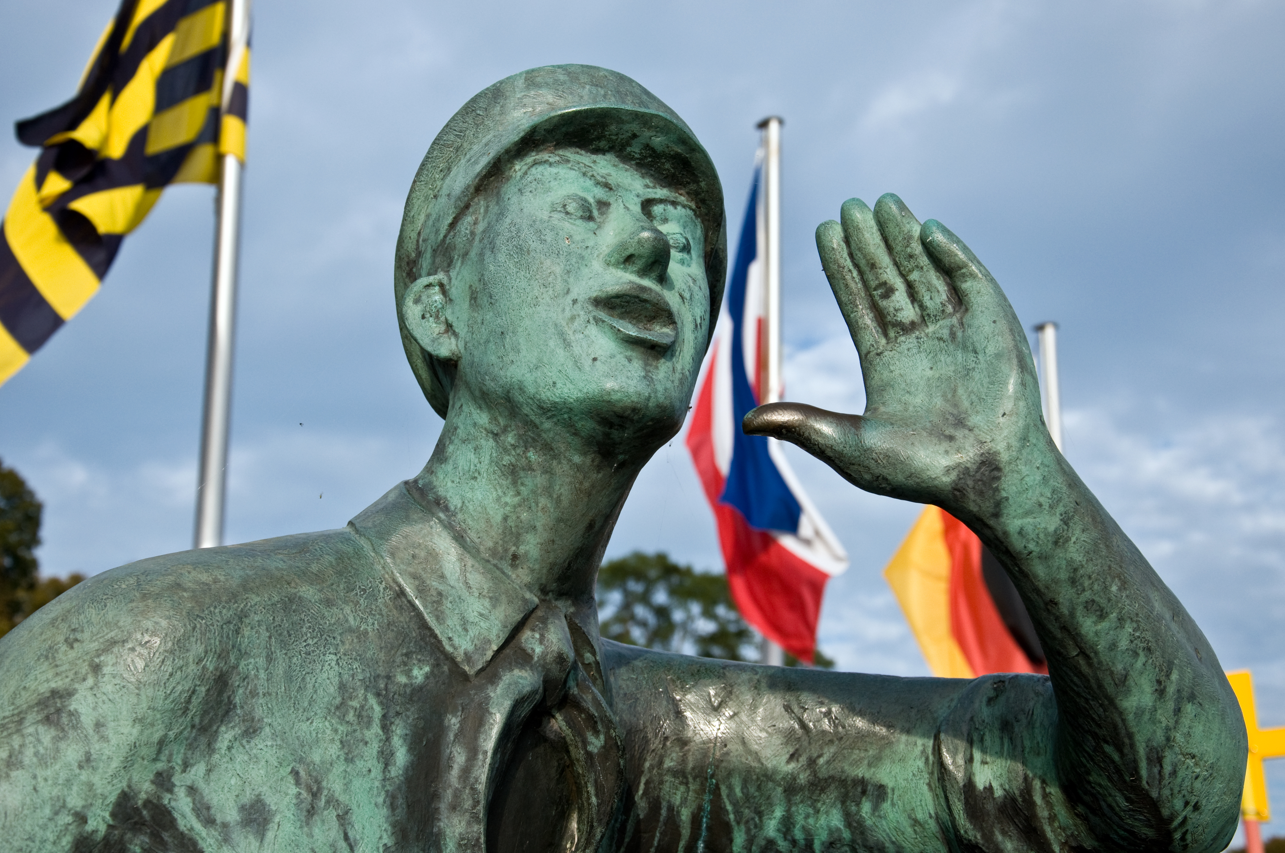 Karlheinz Goedtke: Lauenburger Rufer (1959) Material: Bronze Standort: Lauenburg/Elbe - Elbstraße Aufnahme: 08.10.2010